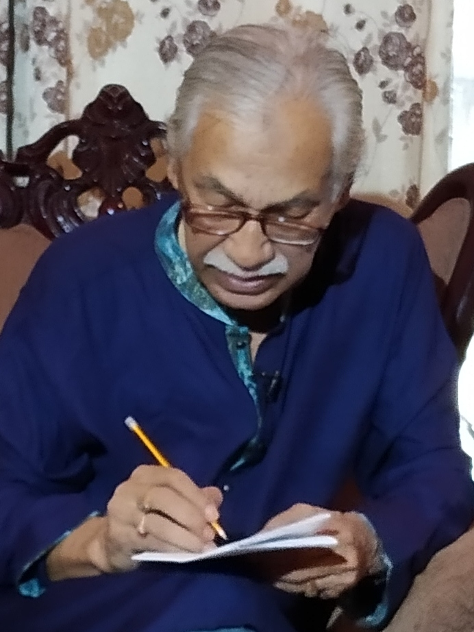 Sheikh Sadi Khan